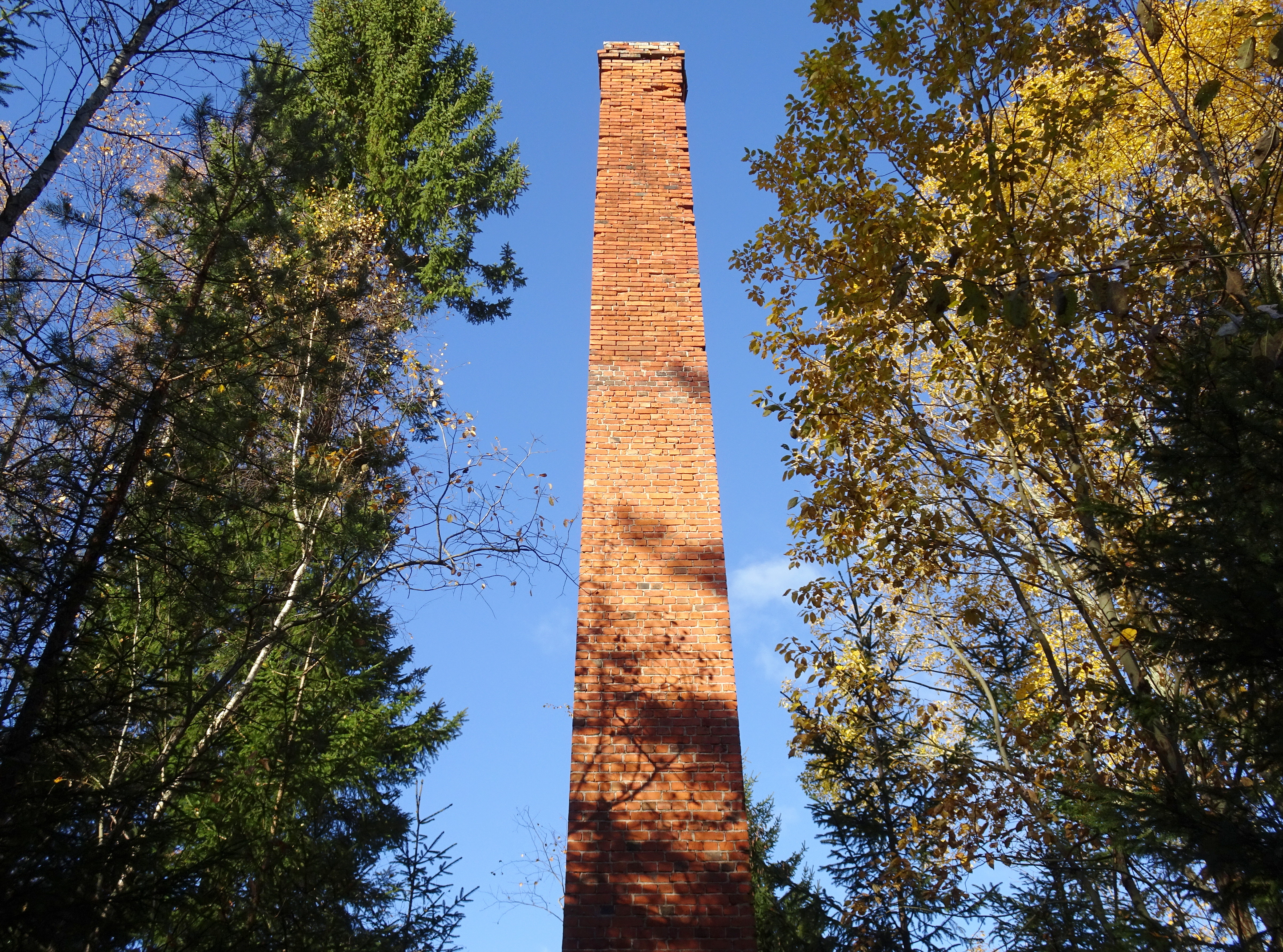 Sandvikens tegelbruks skorsten